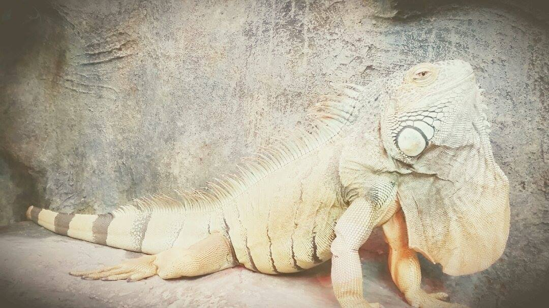 Tagen i Kvinnerstaskolans djurhus.